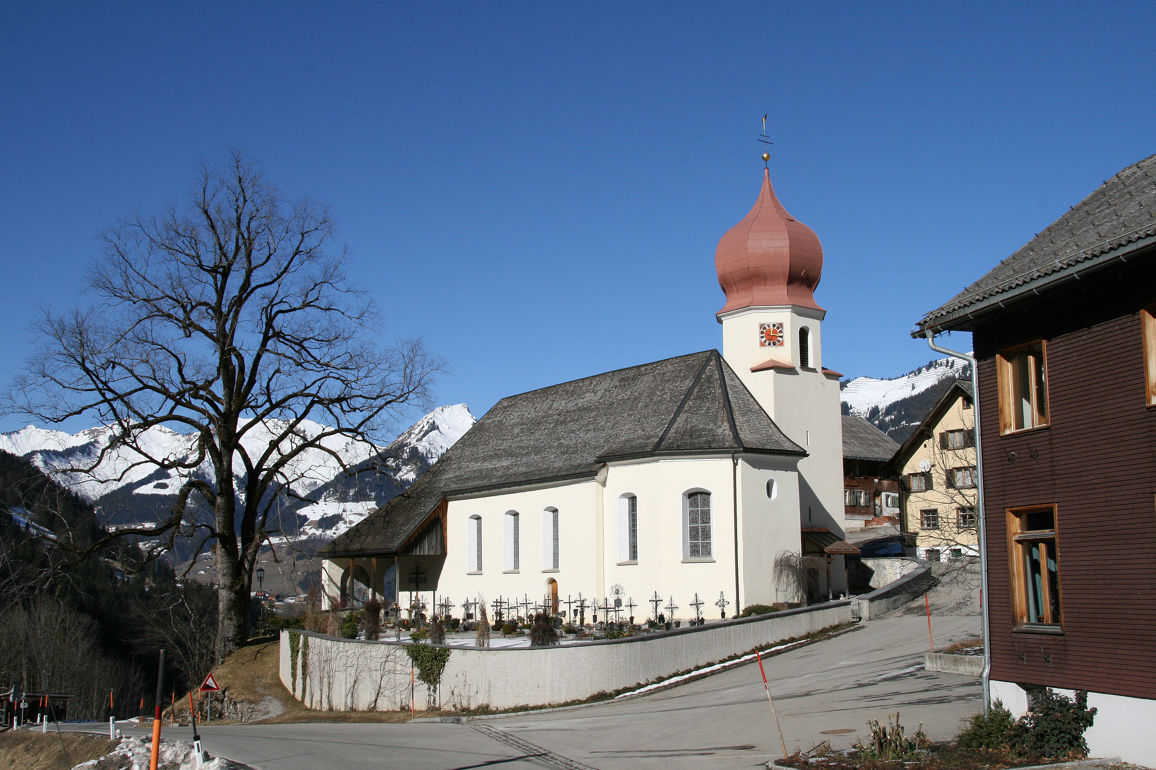 Kuratienkirche hl. Katharina, in Marul bei Raggal im grossen Walsertal, Vorarlberg.